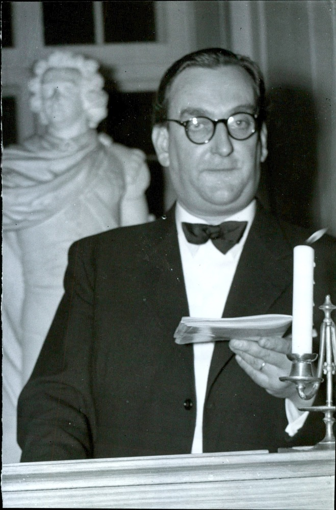 Regissör Gunnar Olsson på Börshuset i Stockholm. Bilden infördes i Svenska Dagbladet 1947-11-25 sid 8 (